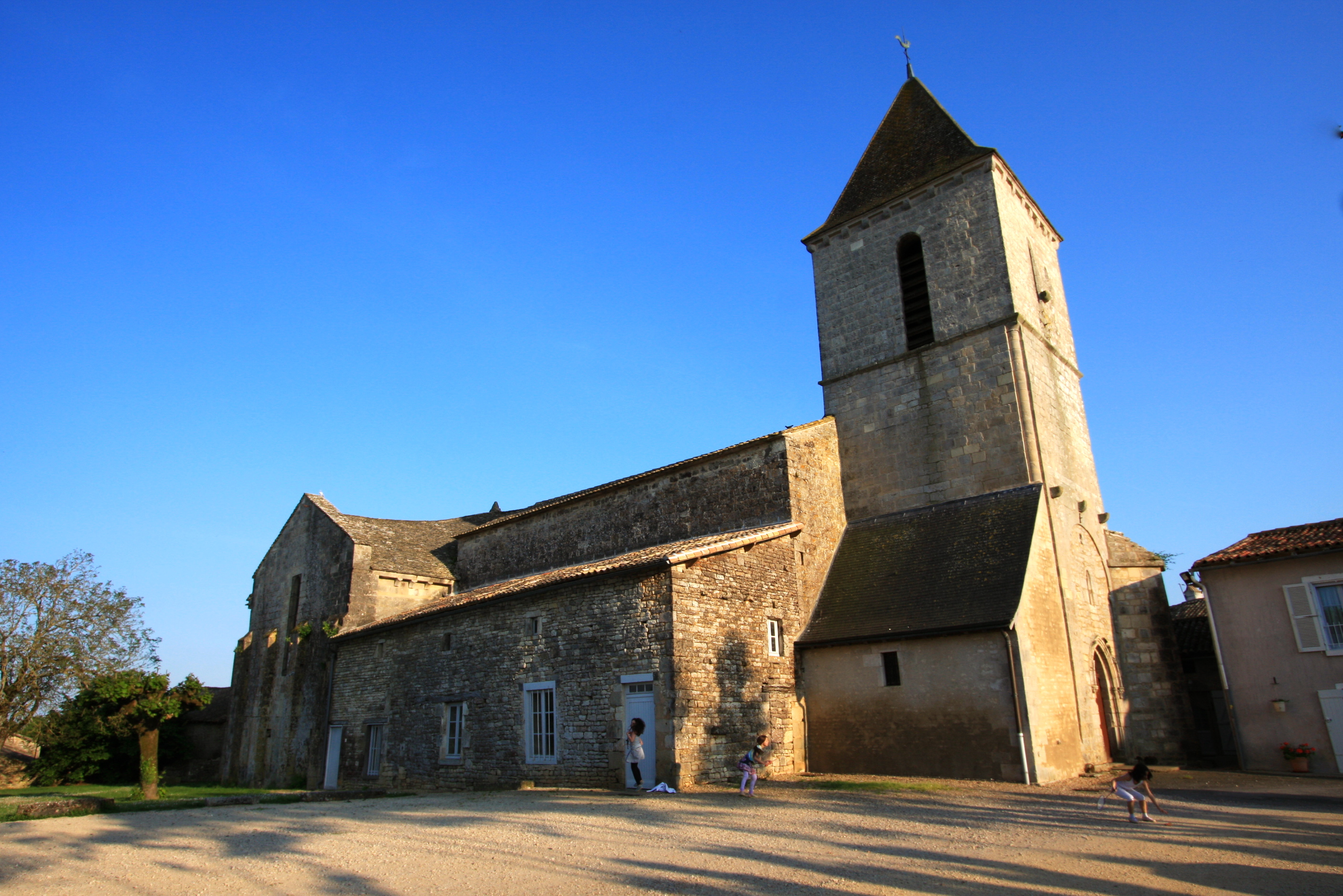 Vue d'ensemble de l'église de St-Sauvant .